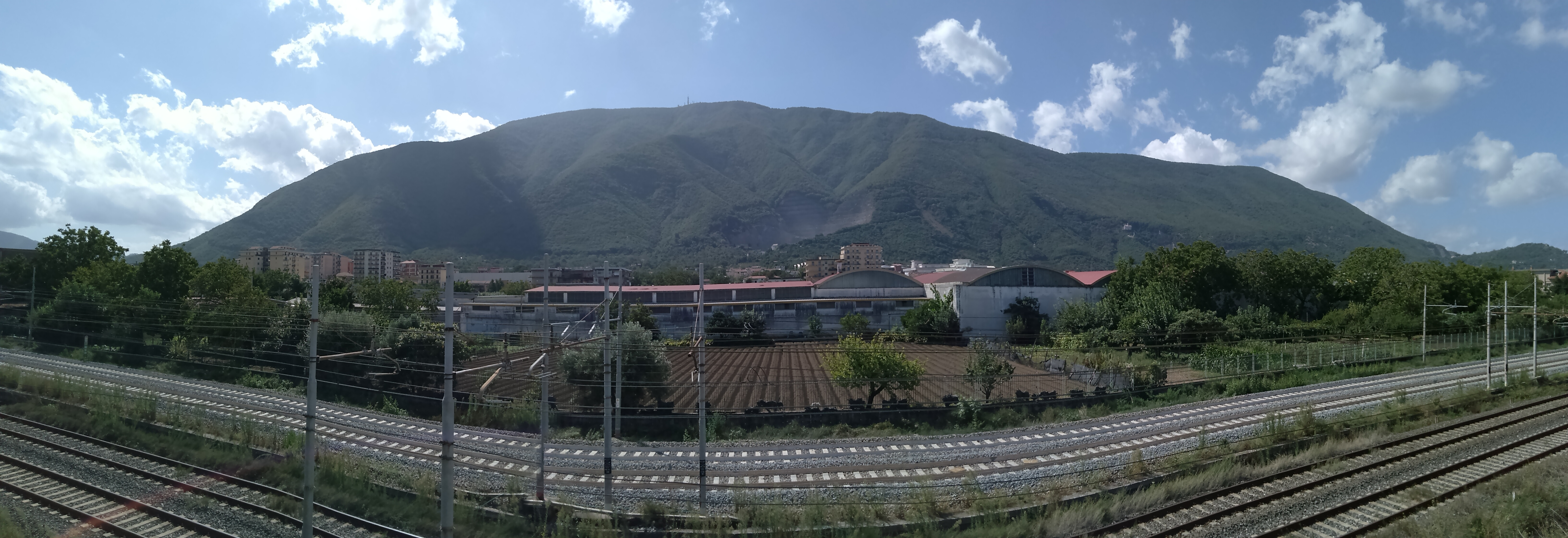 Il Monte Albino visto da Nocera Superiore